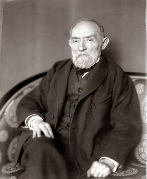 Kiss József magyar költő, szerkesztő.